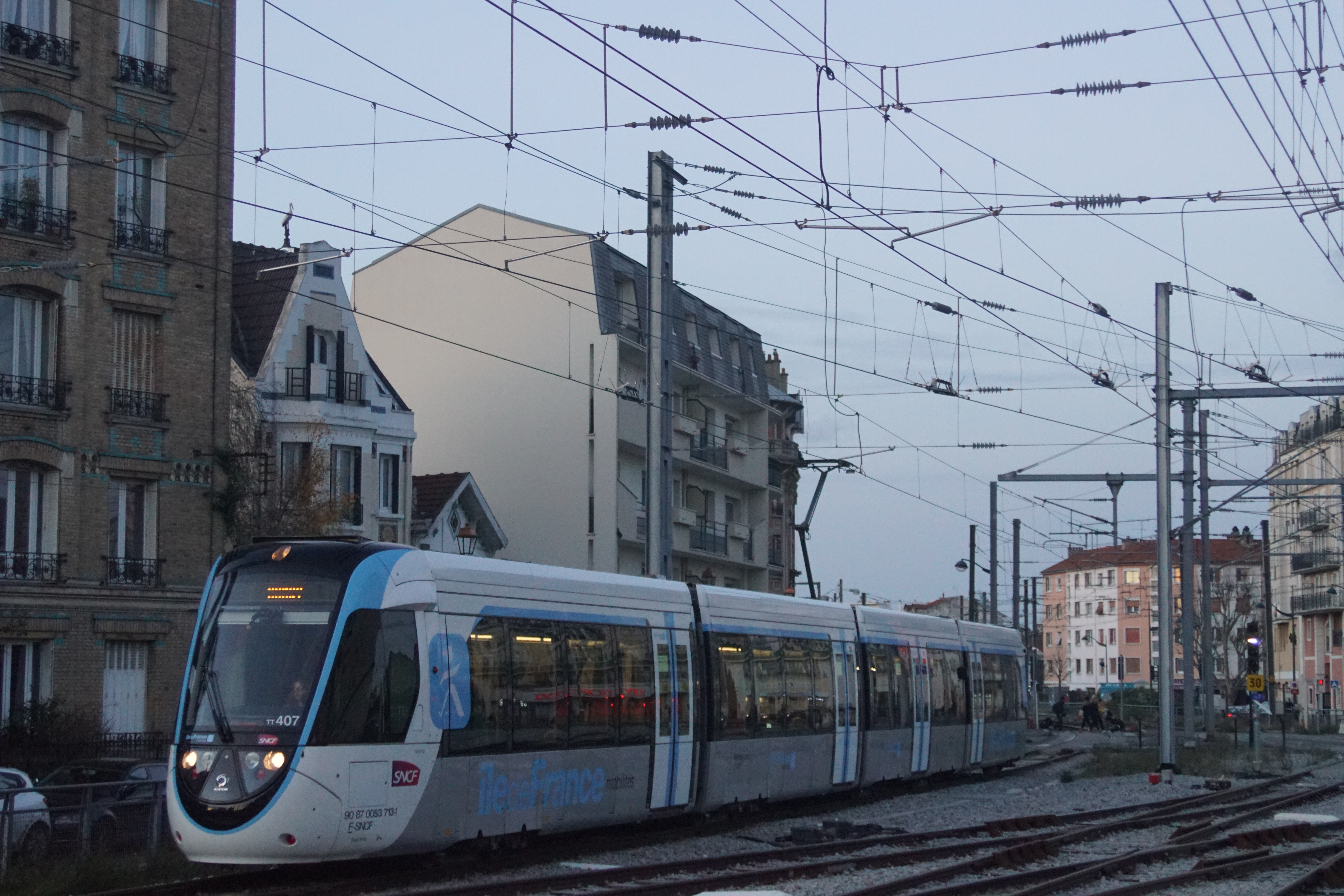 Un des U 53700 (série Alstom Dualis) de la ligne 4 à l'approche de la gare de Gargan, le jour de l'inauguration du débranchement de la ligne des Coquetiers, vers Clichy-Montfermeil.